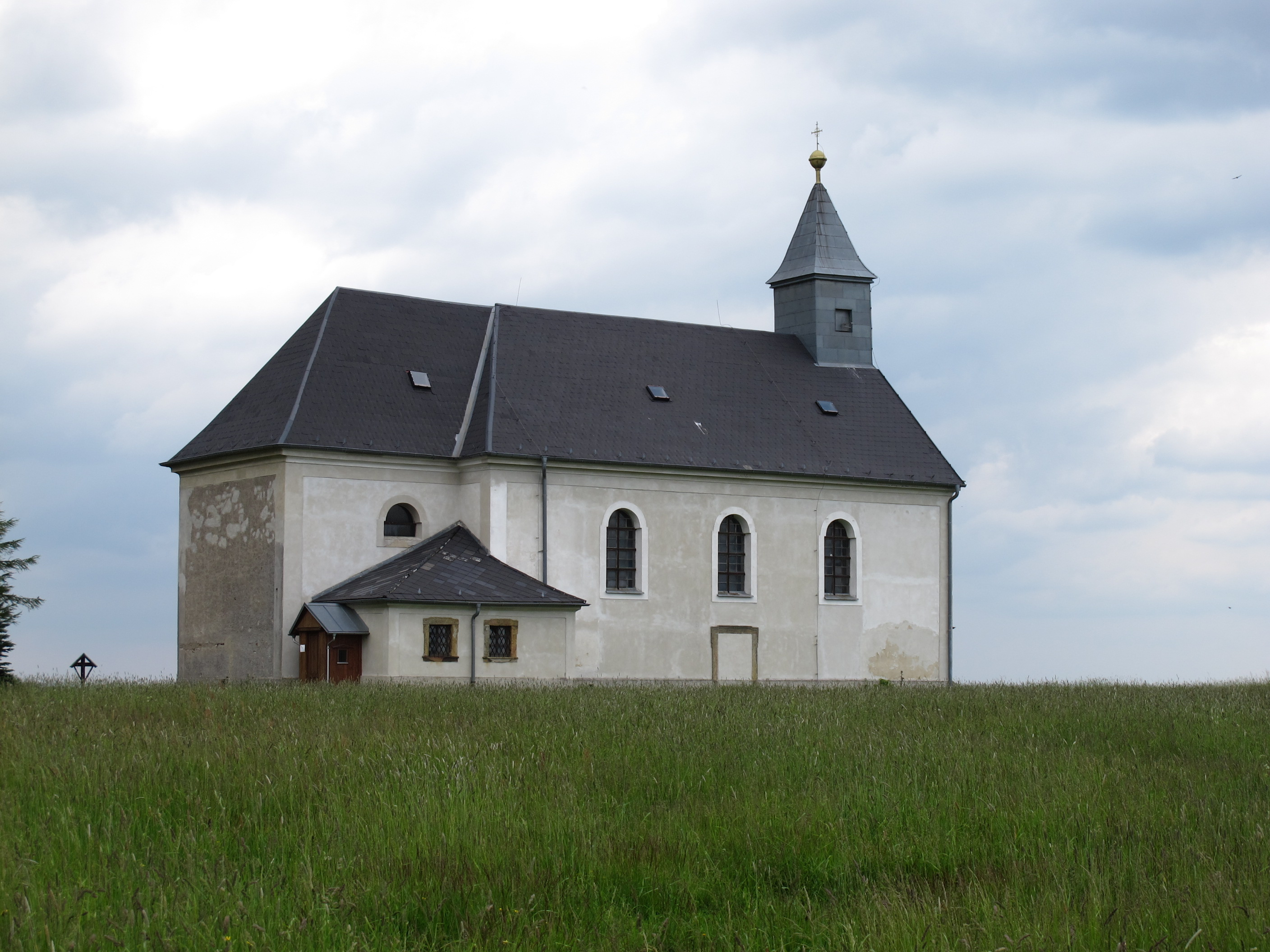 Malý Háj - klasicistní kostel Nejsvětější Trojice